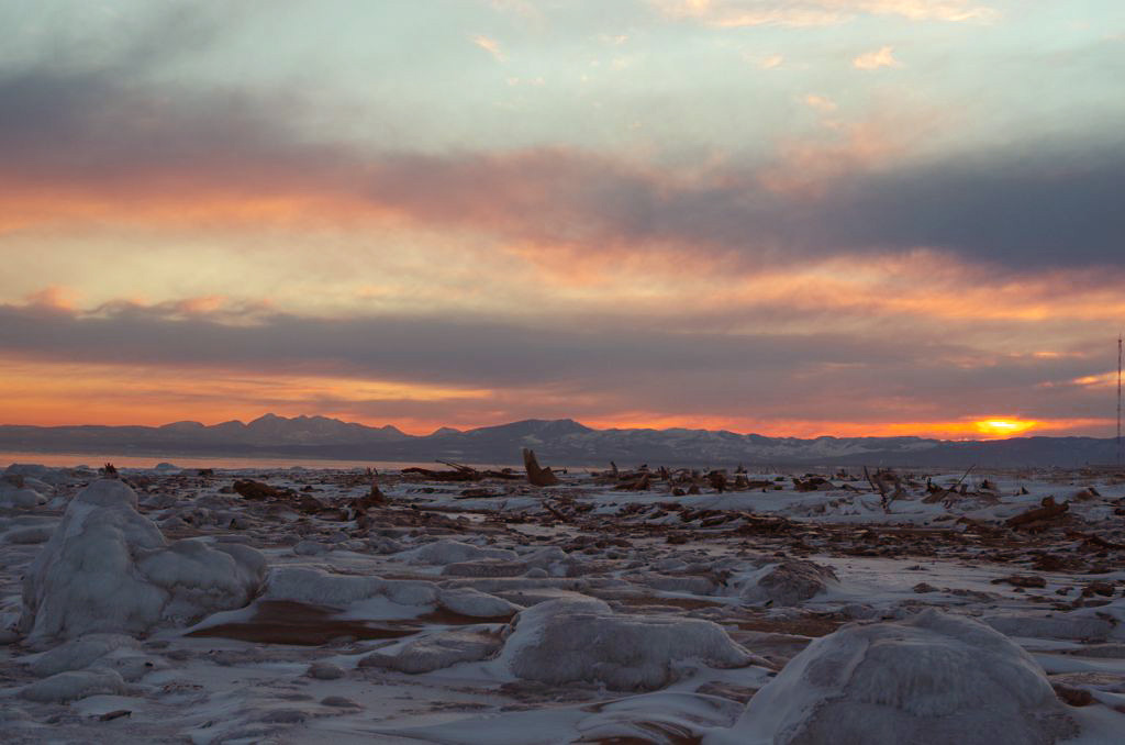 Поронайский заповедник, Поронайский городской округ This image is related to the protected area of Russia number 6500064